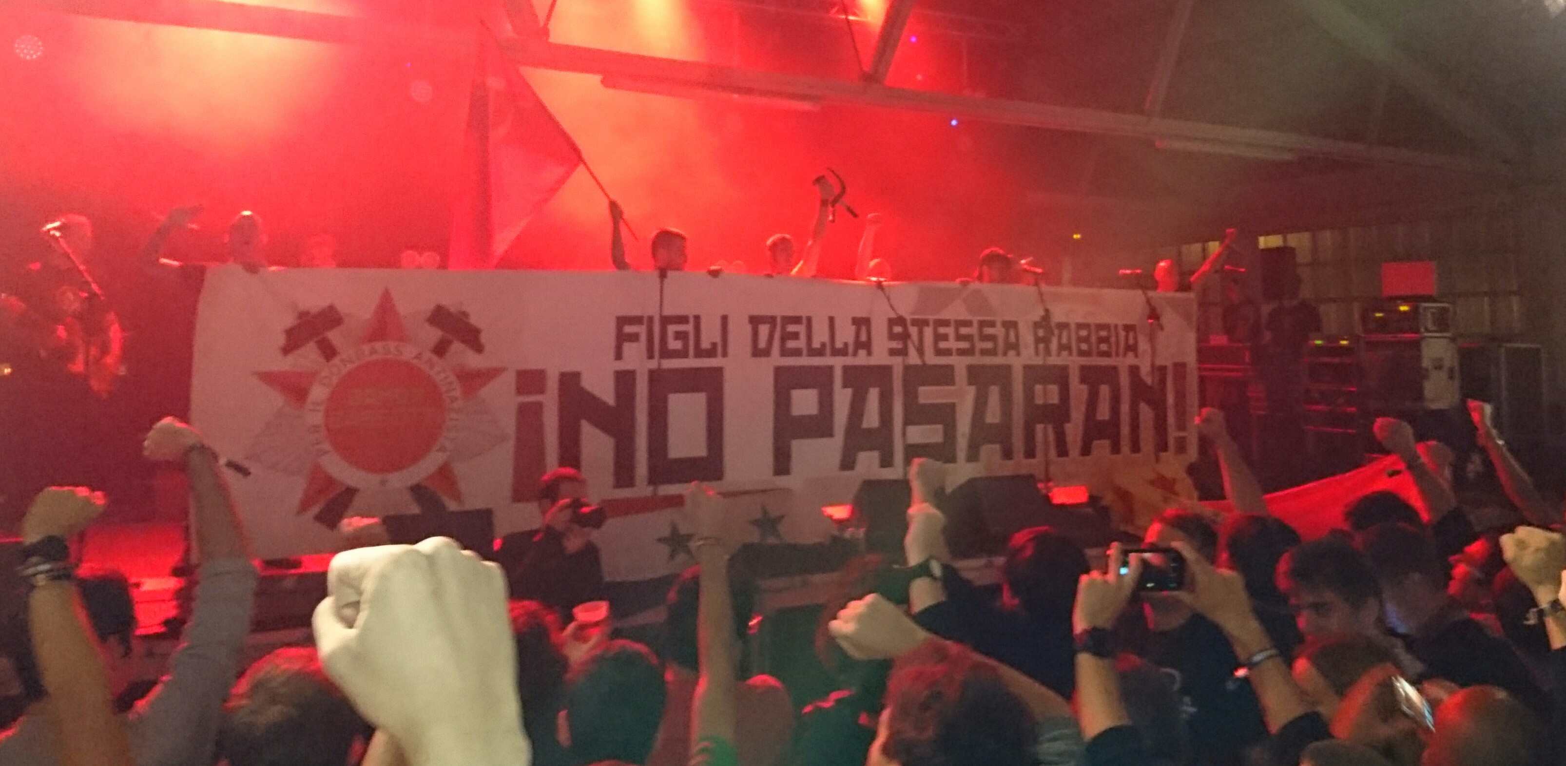 Pancarta treta pel grup de música Banda Bassotti al concert del Castanyada Rock de 2015, celebrat a Piera (Anoia, Països Catalans).